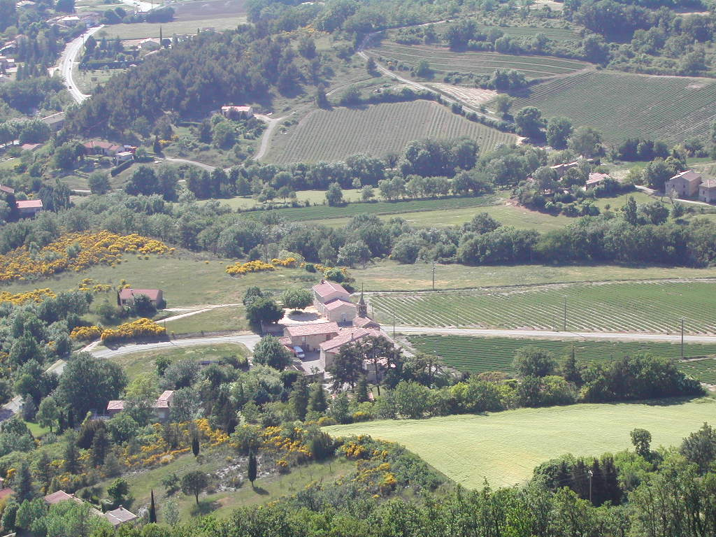 Souspierre, commune française située en Drôme provençale (26). Vue depuis le «Chastelas».